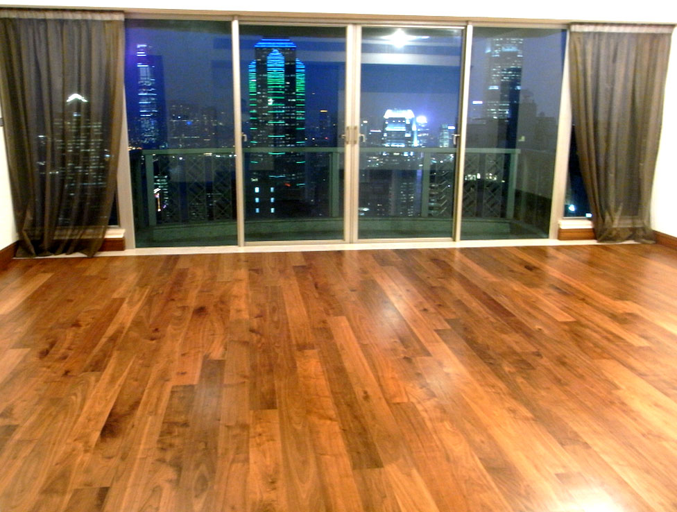 中文（香港）: 中環羅便臣道31號